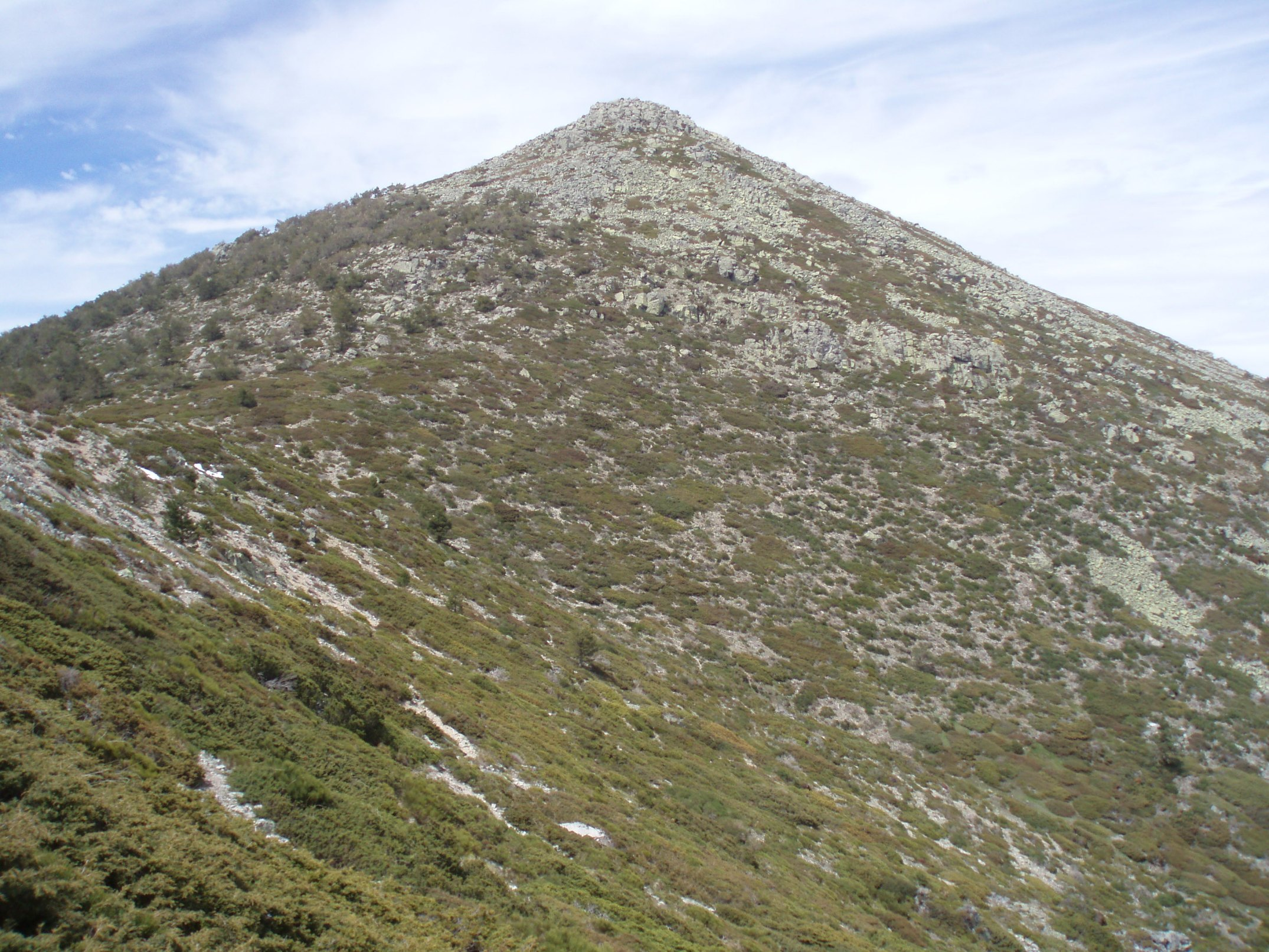 Vertiente sur de Montón de Trigo visto desde Cerro Minguete (Sierra de Guadarrama, España).